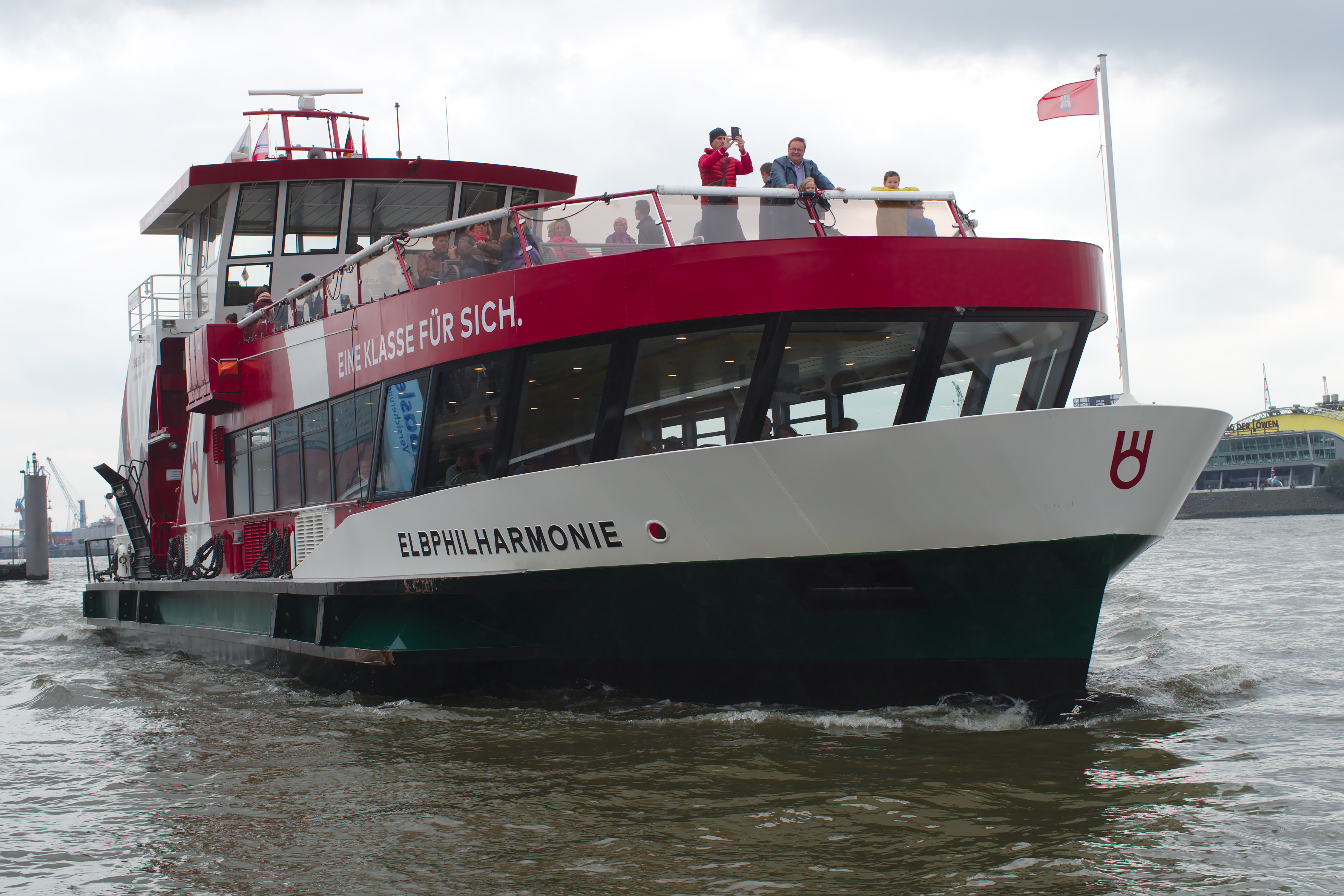 HADAG Elbphilharmonie kurz vor dem Anlegen an den Landungsbrücken, Hamburg.